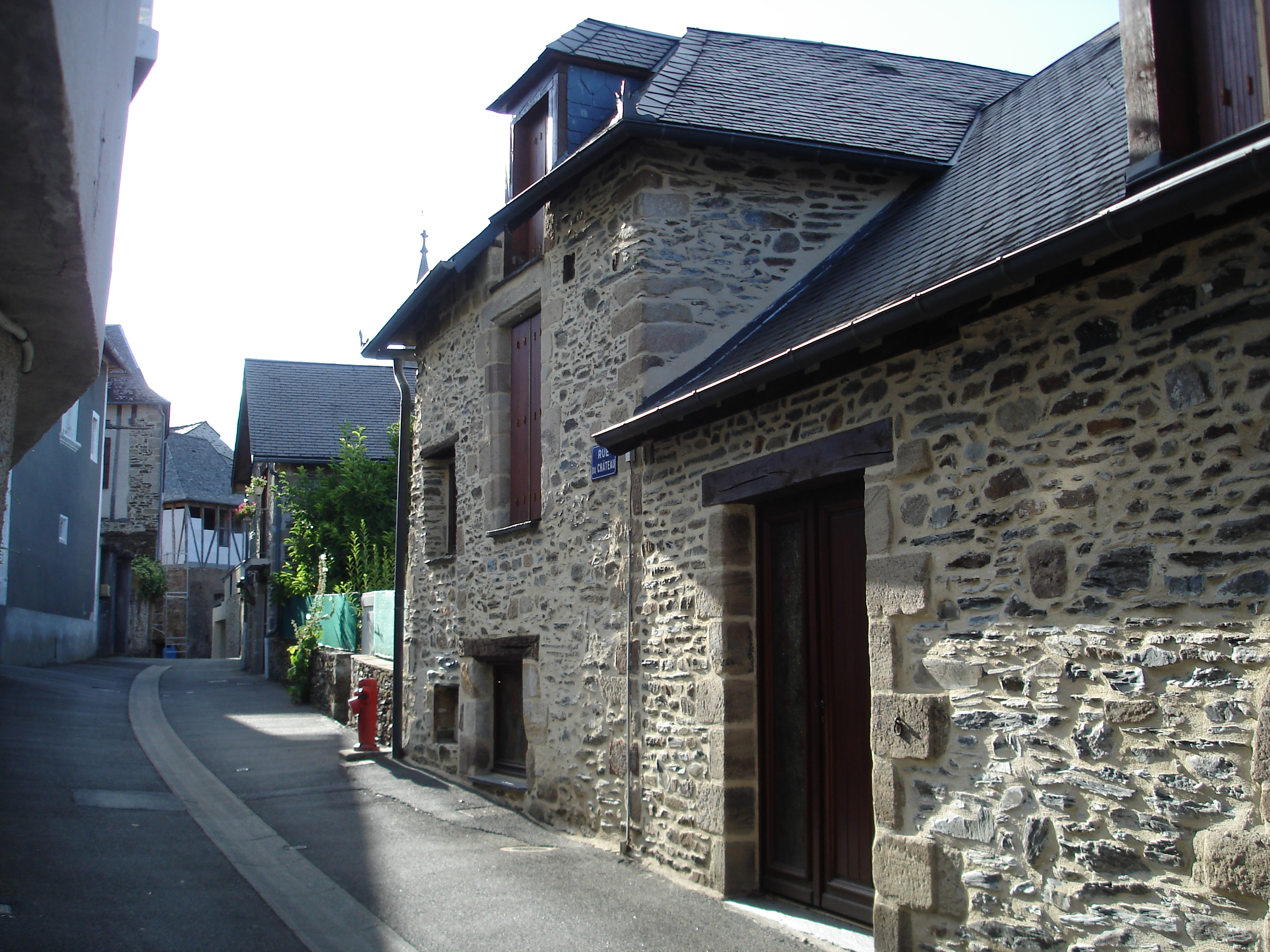 Ruelle médiévale de Donzenac (Domzenac en occitan), commune française, située dans le département de la Corrèze et la région Limousin.